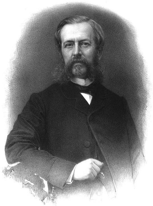 Ferdinand-Charles-Léon, comte de Lasteyrie du Saillant